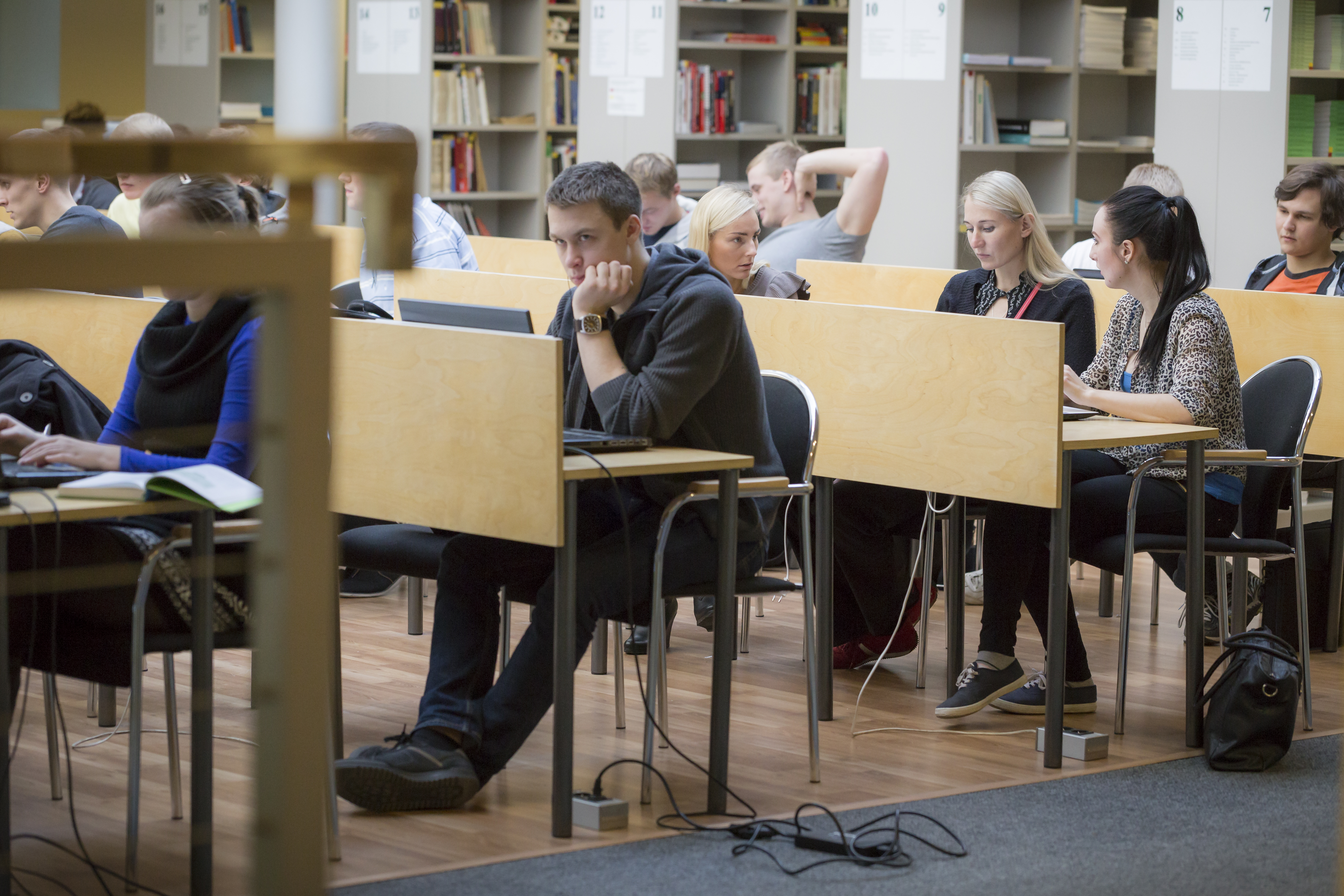 Tallinna Tehnikakõrgkooli raamatukogu